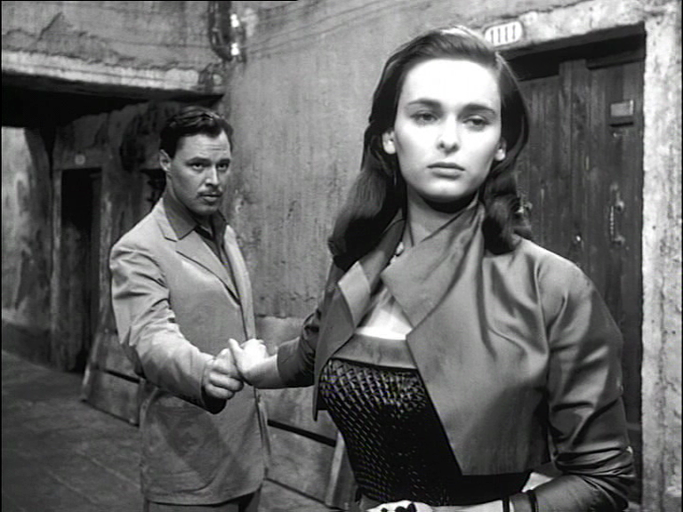 Screenshot del film La signora senza camelie (1953) di Michelangelo Antonioni.